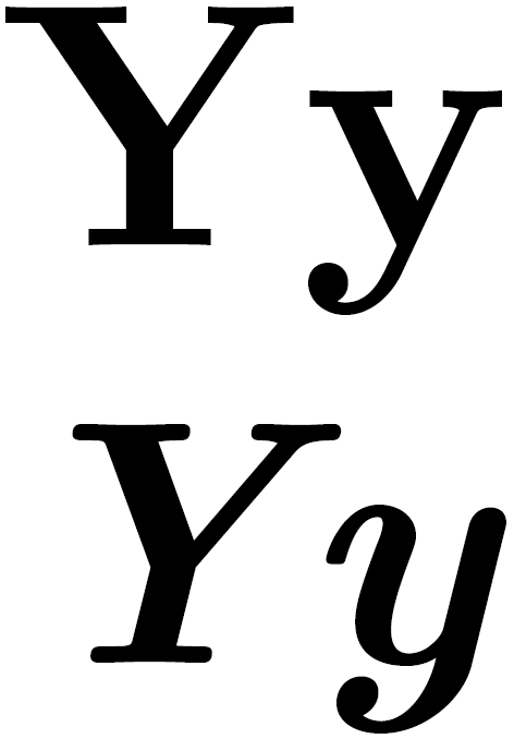 Latin letter Y